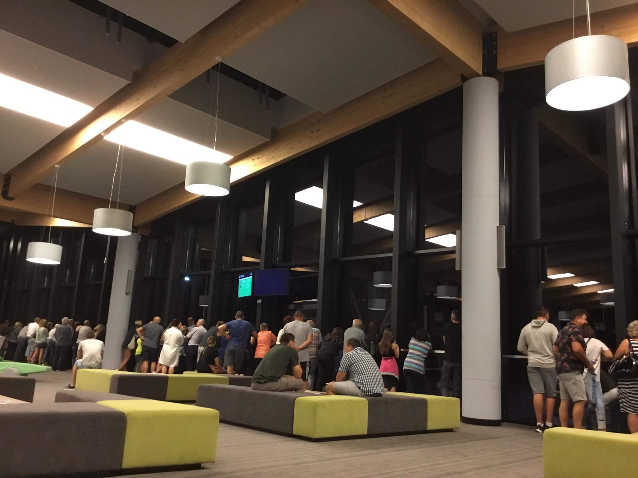 Taras widokowy na 1-szym piętrze terminala lotniska Olsztyn-Mazury